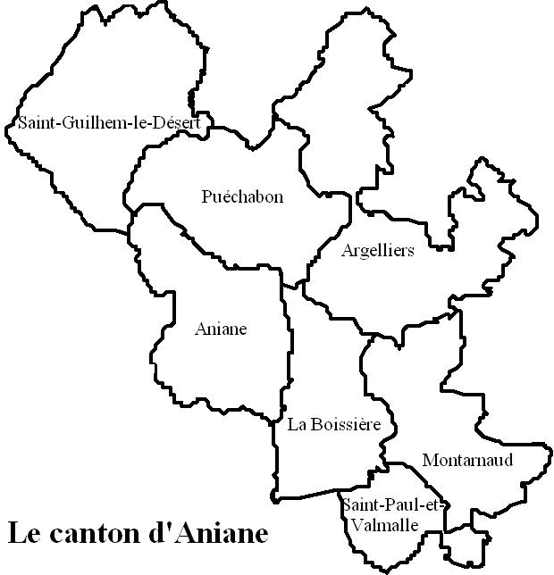 Le canton d'Aniane Image personnelle